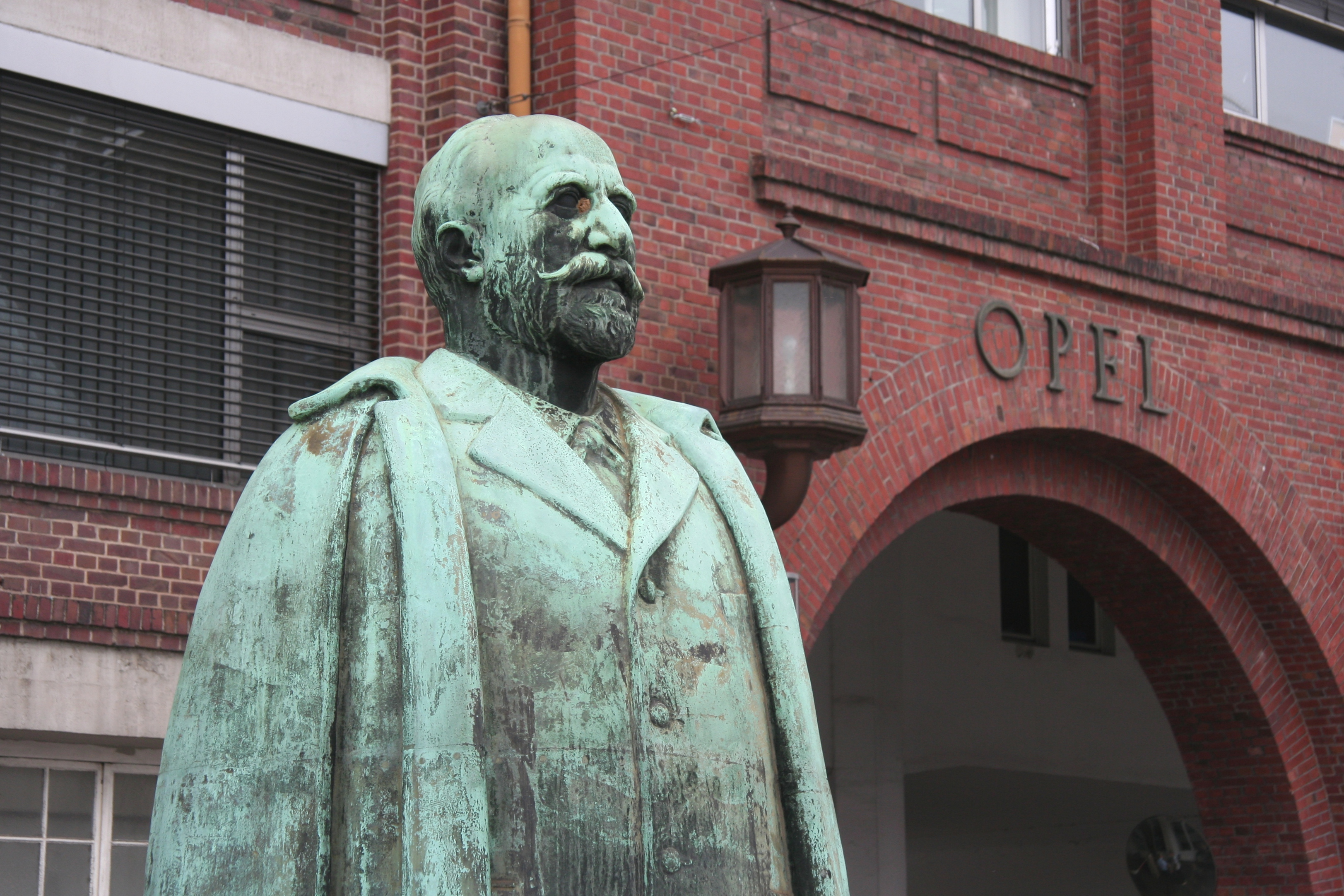 Adam-Opel-Denkmal (Detail) am Haupttor des alten Opelwerks